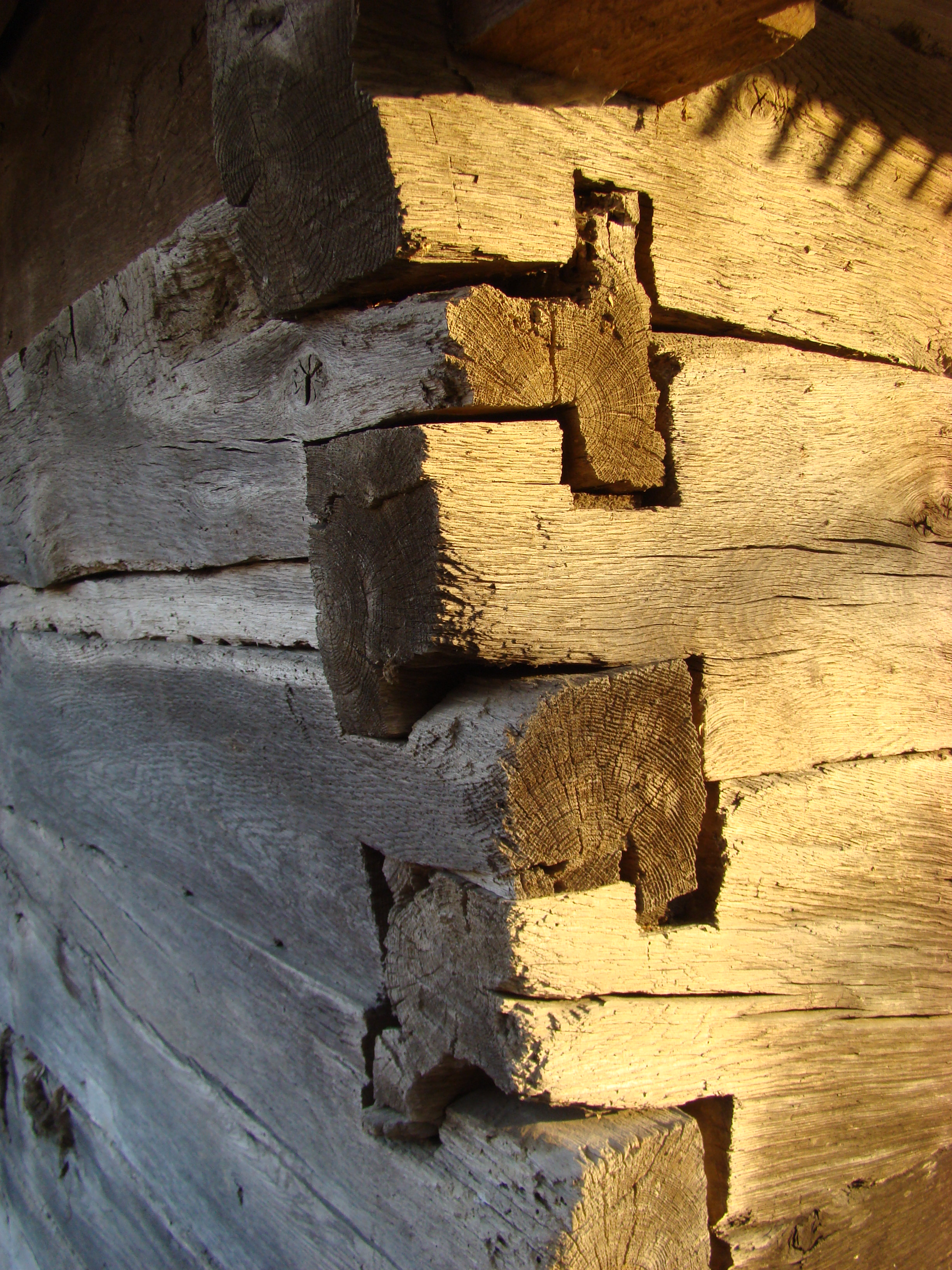 Biserica de lemn din Racâș, județul Sălaj